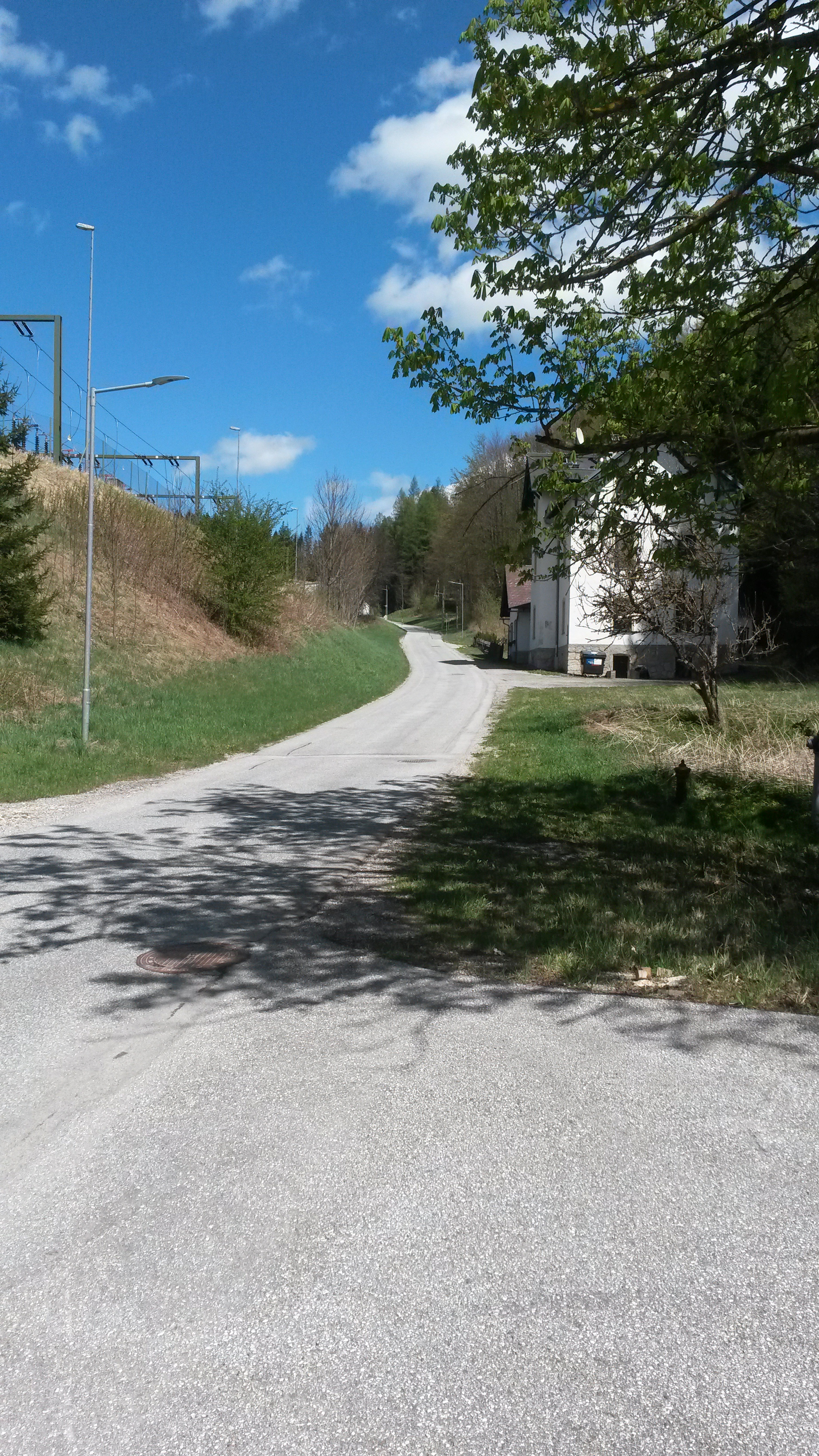 Anstieg der "Alten Reichsstraße" zum Semmeringpass, steirische Seite.